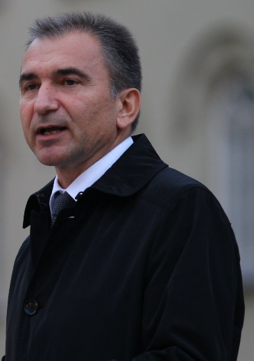 Janko Veber